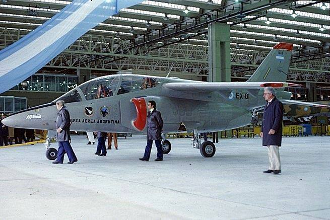 El 10 de octubre de 1984, en la Escuela de Aviación Militar se realiza el primer vuelo oficial del entrenador avanzado de reacción IA-63 Pampa (EX-01), con la presencia del gobernador de Córdoba y de altas autoridades de la Fuerza Aérea Argentina. La tripulación estaba compuesta por el vicecomodoro Genaro Mario Sciola y el mayor Horacio Armando Oréfice.